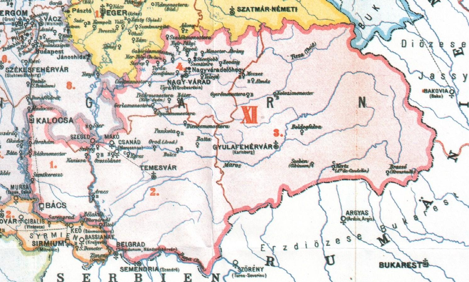 Kirchenprovinz Kalocsa, 1909. Aus: Cölestin Wolfsgruber, Kirchengeschichte Österreich-Ungarns, Wien 1909.